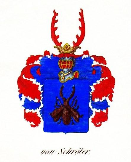 Wappen der zu Beginn des 19. Jh.s im Mecklenburgischen ansässig gewordenen Familie von Schröter (Reichsadel seit 1557).